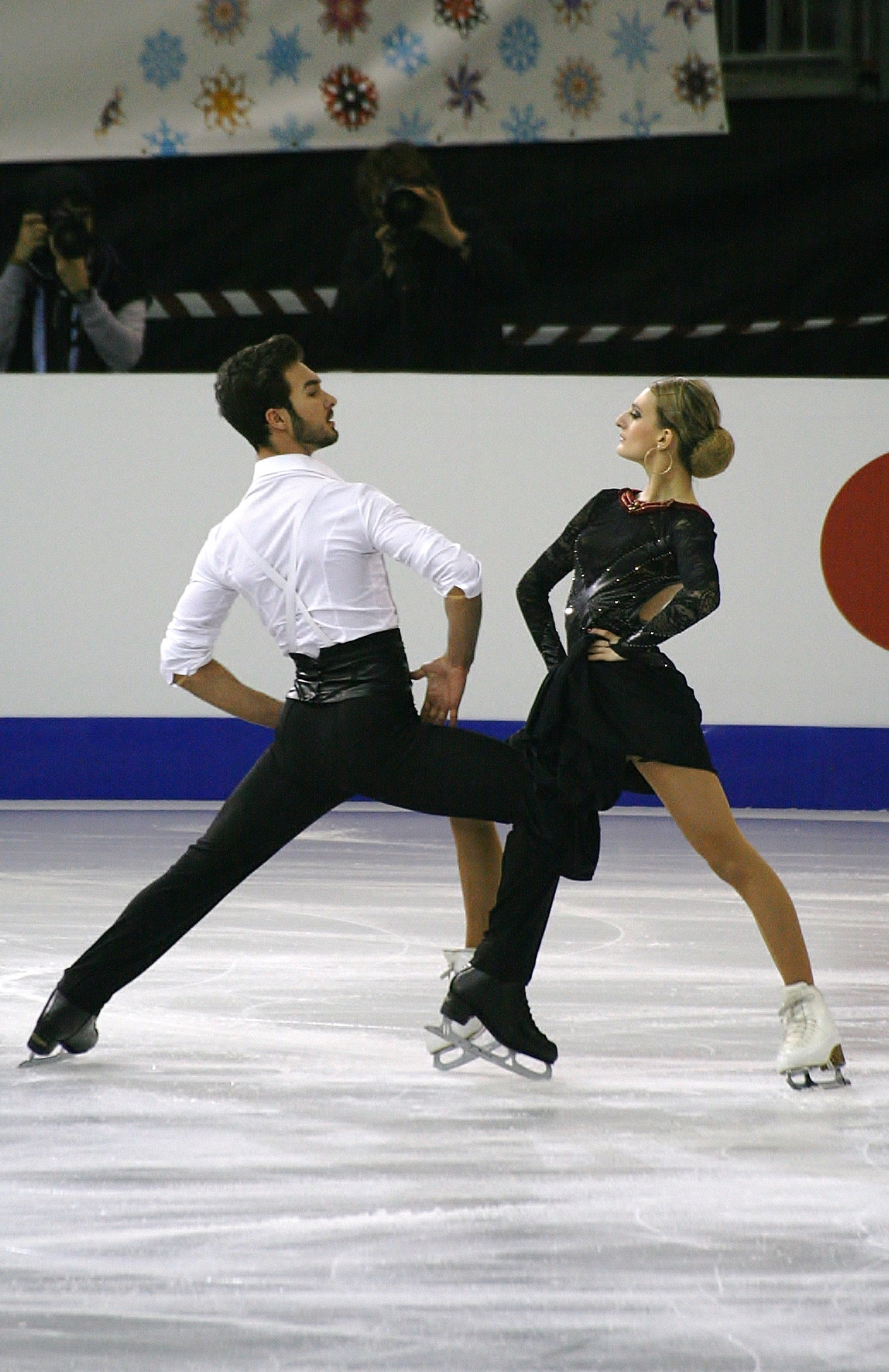 Габриэла Пападакис и Гийом Сизерон (Франция) на финале Гран-при по фигурному катанию 2014-2015.